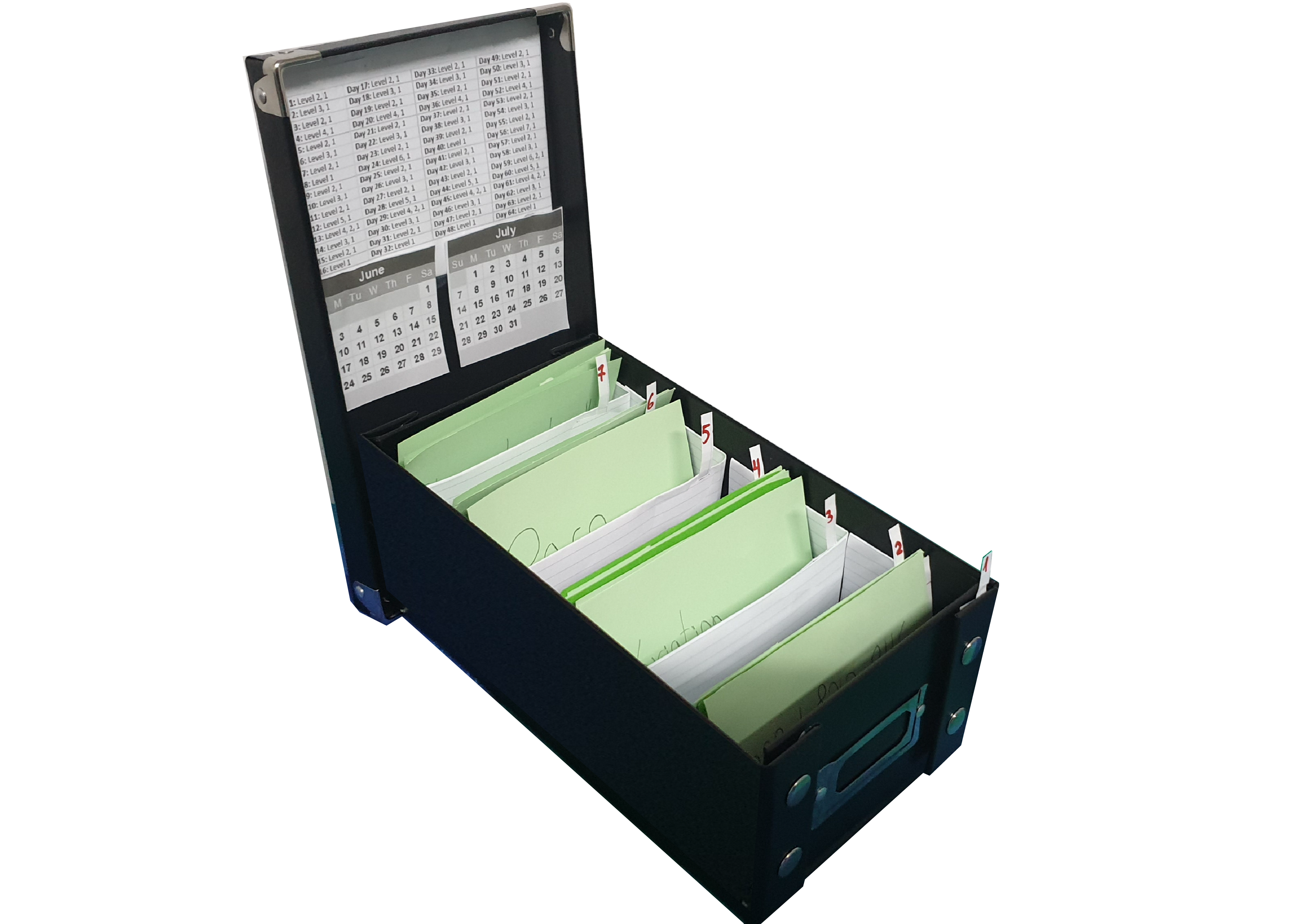 קופסאת לייטנר ,שיטת שוטף תמידי, מערכת למידה של 7 רמות, 64 ימים